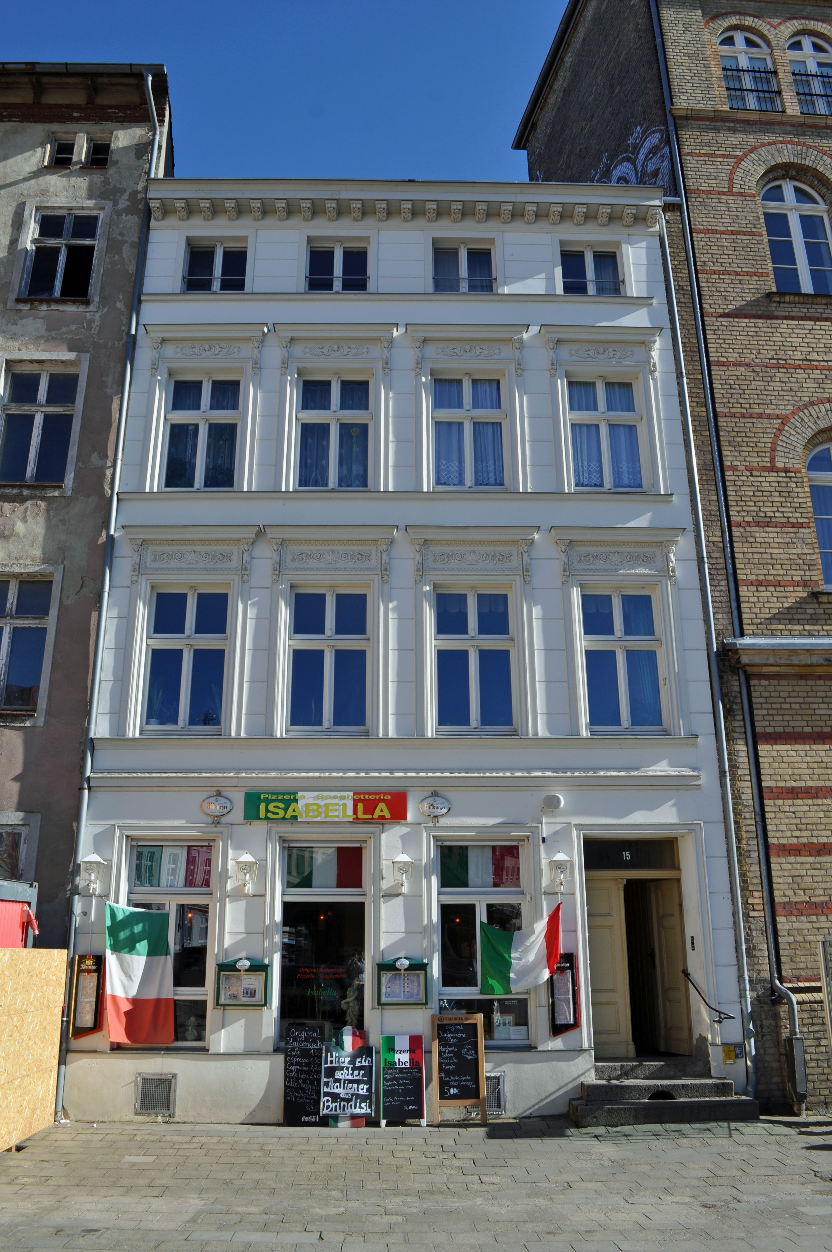 Gebäude bzw. Gebäudedetail in Stralsund. Straße und Hausnummer siehe Dateiname. Das Gebäude ist als Baudenkmal ausgewiesen, siehe dazu die Liste der Baudenkmale in Stralsund.